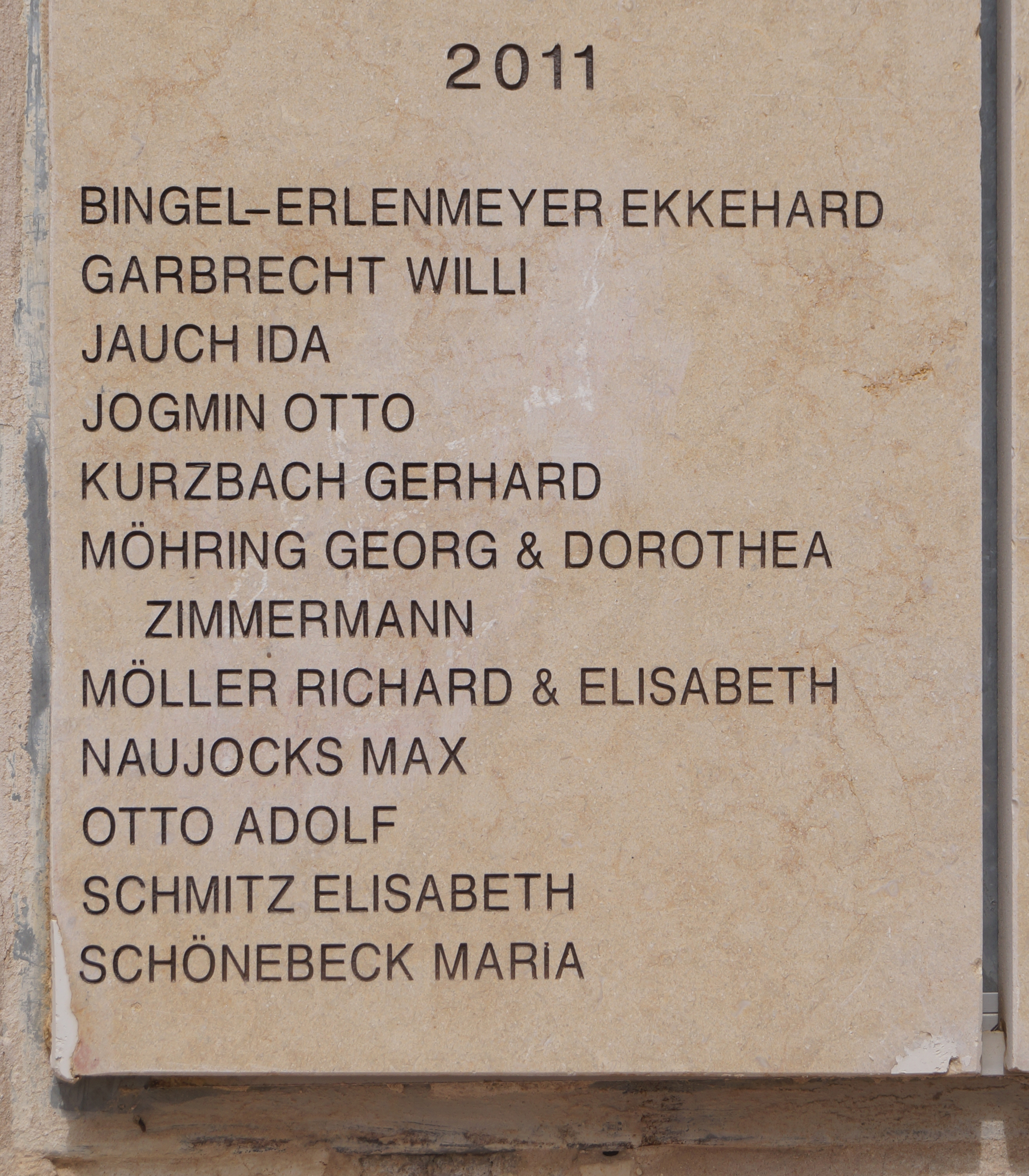 Gedenkstätte Yad Vashem, Jerusalem, Israel, Wall of Honor im Garten der Gerechten unter den Völkern. Ausschnitt der Platte des Jahres 2011 mit den Geehrten aus Deutschland, darunter Ekkehard Bingel-Erlenmeyer, Willi Garbrecht, Ida Jauch, Otto Jogmin, Gerhard Kurzbach, Georg & Dorothea Möhring, Zimmermann, Richard & Elisabeth Möller, Max Naujocks, Adolf Otto, Elisabeth Schmitz, Maria Schönebeck.